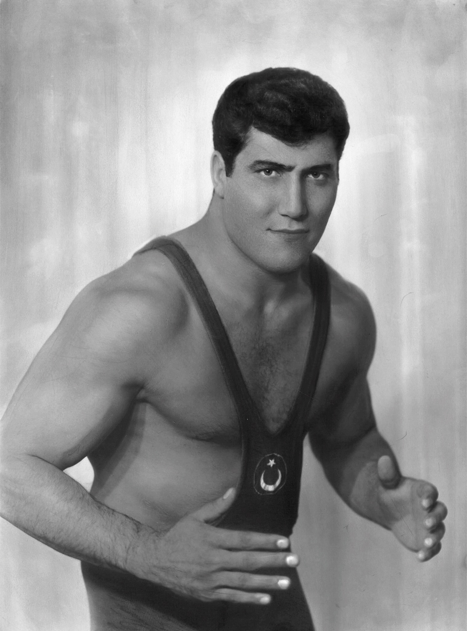 Bu, Gıyasettin Yılmaz'ın bir fotoğrafıdır. 1938'de Kekeç, Selim, Kars'ta doğan güreşçi, 1961 yılında askerlik görevini yaparken Jandarma Gücü Spor Kulübü'nün dikkatini çekmiş, sonrasında milli takıma seçilmiştir. 1976 yılına kadar da güreşin önemli isimleri arasına girmeyi başarmıştır. 200'ün üstünde milli olan sporcu, 1970–1974 yılları arasında milli takım kaptanlığı yapmıştır. 1964 Tokyo Olimpiyatları, 1968 Meksiko Olimpiyatları ve 1972 Münih Olimpiyatlarına katılmıştır. 15 sene boyunca çeşitli karşılaşmalarda muhtelif dereceler kazanmıştır; 1970 Dünya Şampiyonasında 3.lük, 1970 Avrupa Şampiyonasında 2.lik, 3 defa Balkan Şampiyonluğu ve 3 defa da Akdeniz Oyunları Şampiyonluğu kazanmıştır. Spor yaptığı dönemlerde güçlü fiziği ile her zaman dikkatleri üzerine toplayan sporcu, şu an Ankara’da mütevazı hayatını sürdürmektedir.